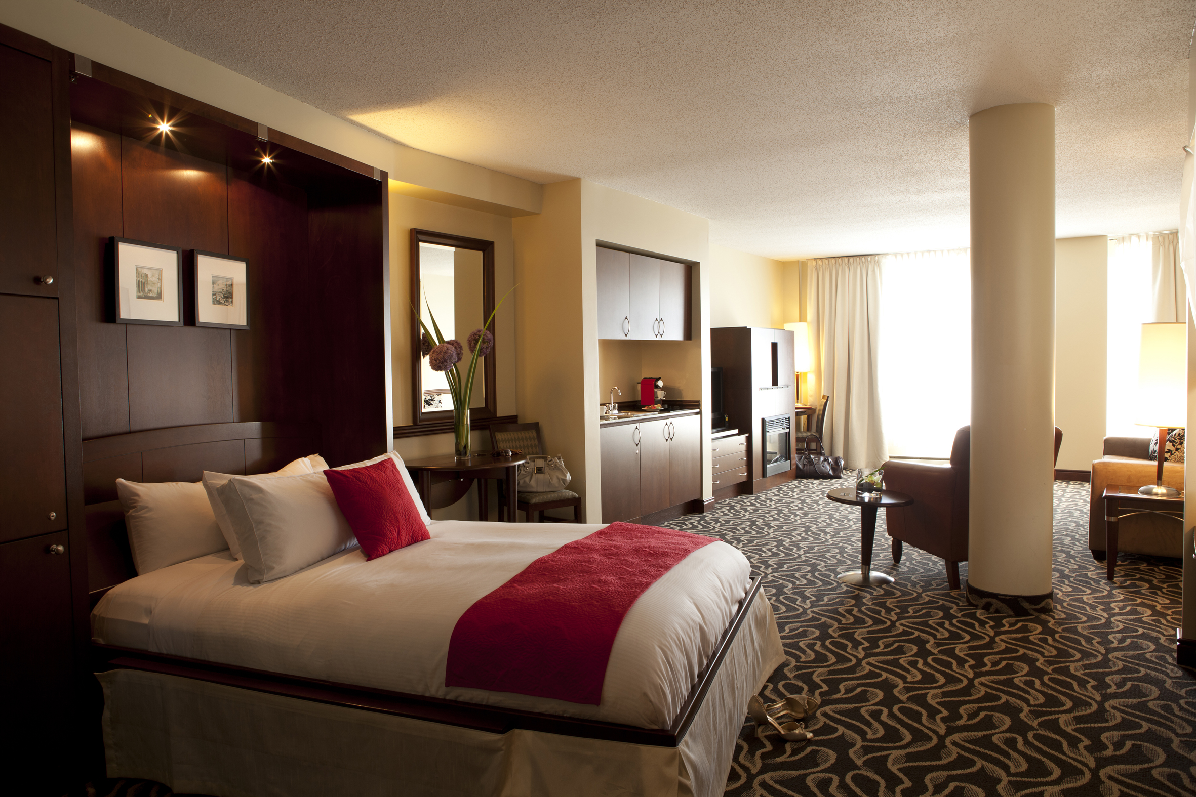 Le site internet de cet hôtel du Vieux Montréal présente les différentes suites de luxe offertes aux visiteurs internationaux, décline les nombreux forfaits proposés et invite également l'internaute à réserver en ligne la suite ou le forfait de son choix.